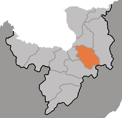 Map of Unhung, Ryanggang-do, DPRK, 2006